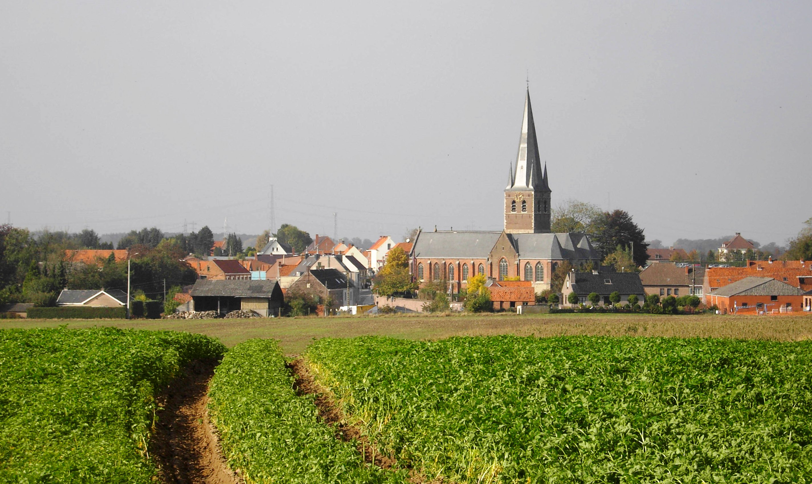 Wortegem (Wortegem-Petegem) - Algemeen zicht